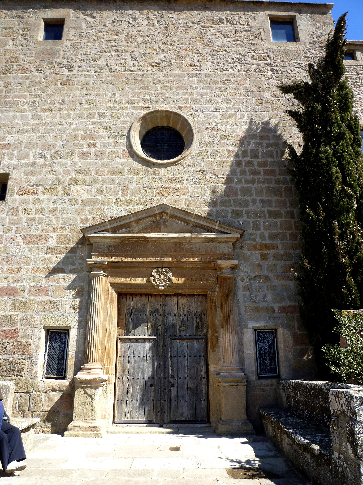 Façana del Santuari de Pinós, a la carena de la Serra